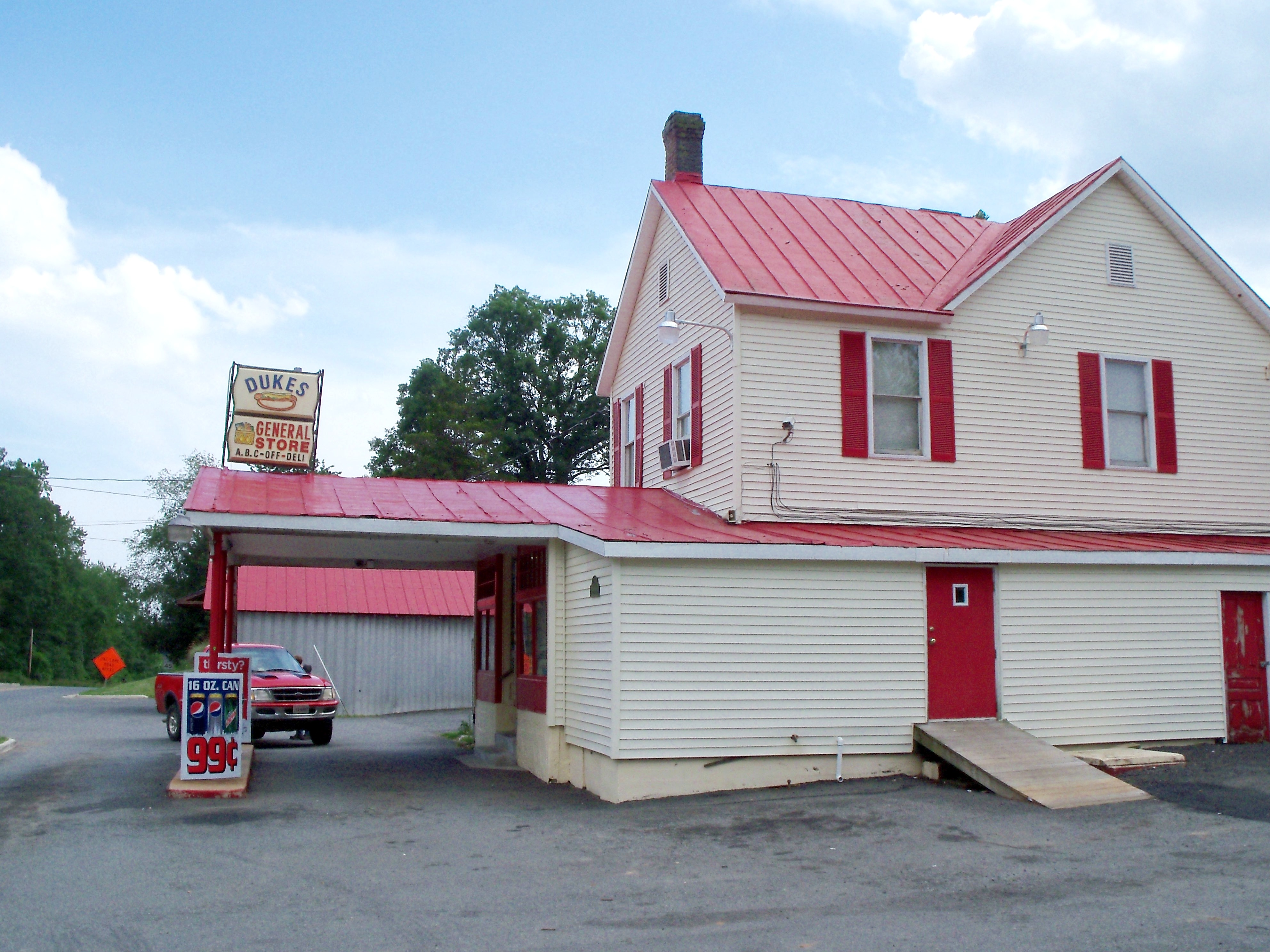 Dukes General Store